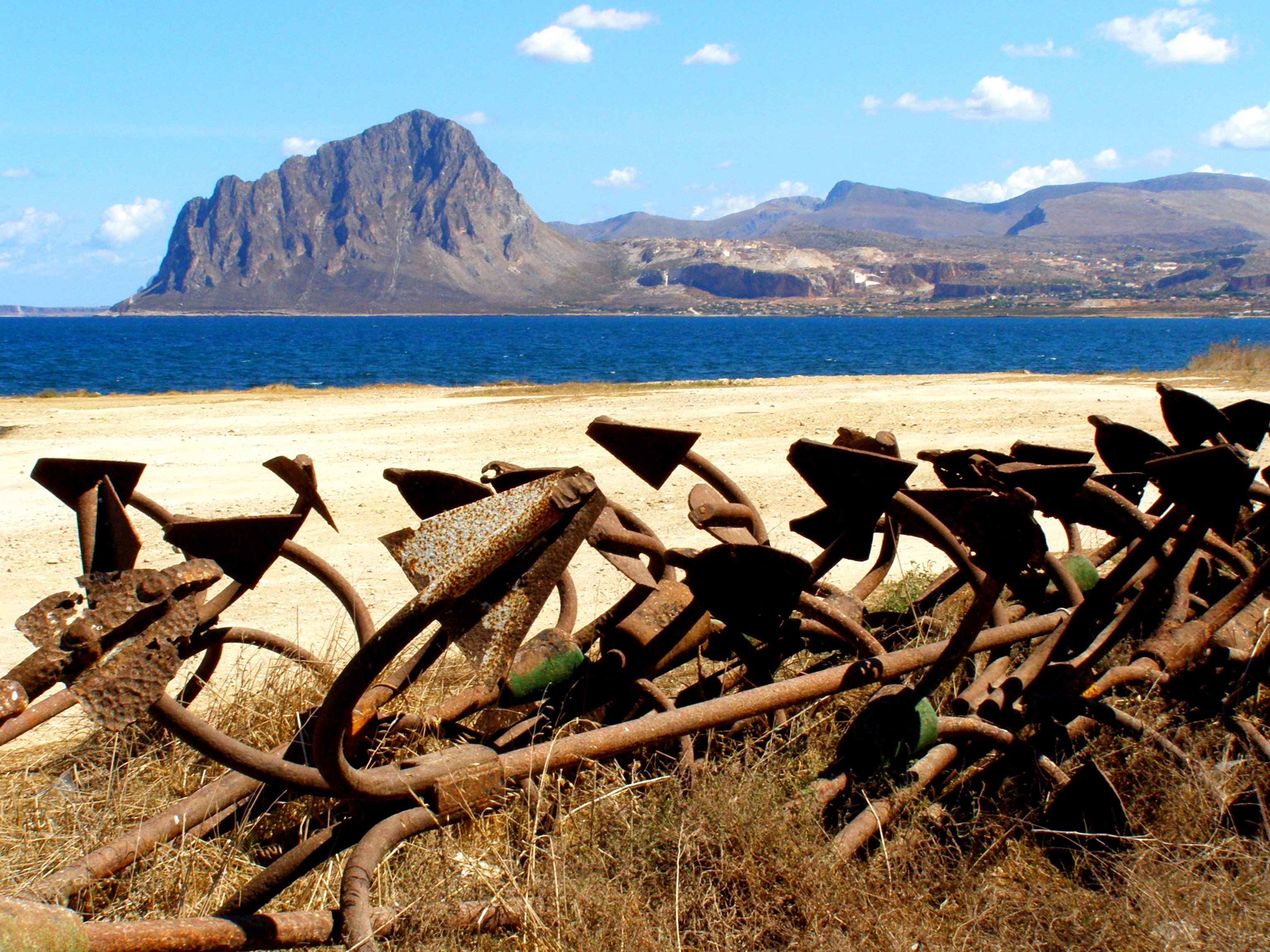 Tonnara di Bonagia e l'omonimo golfo, Trapani